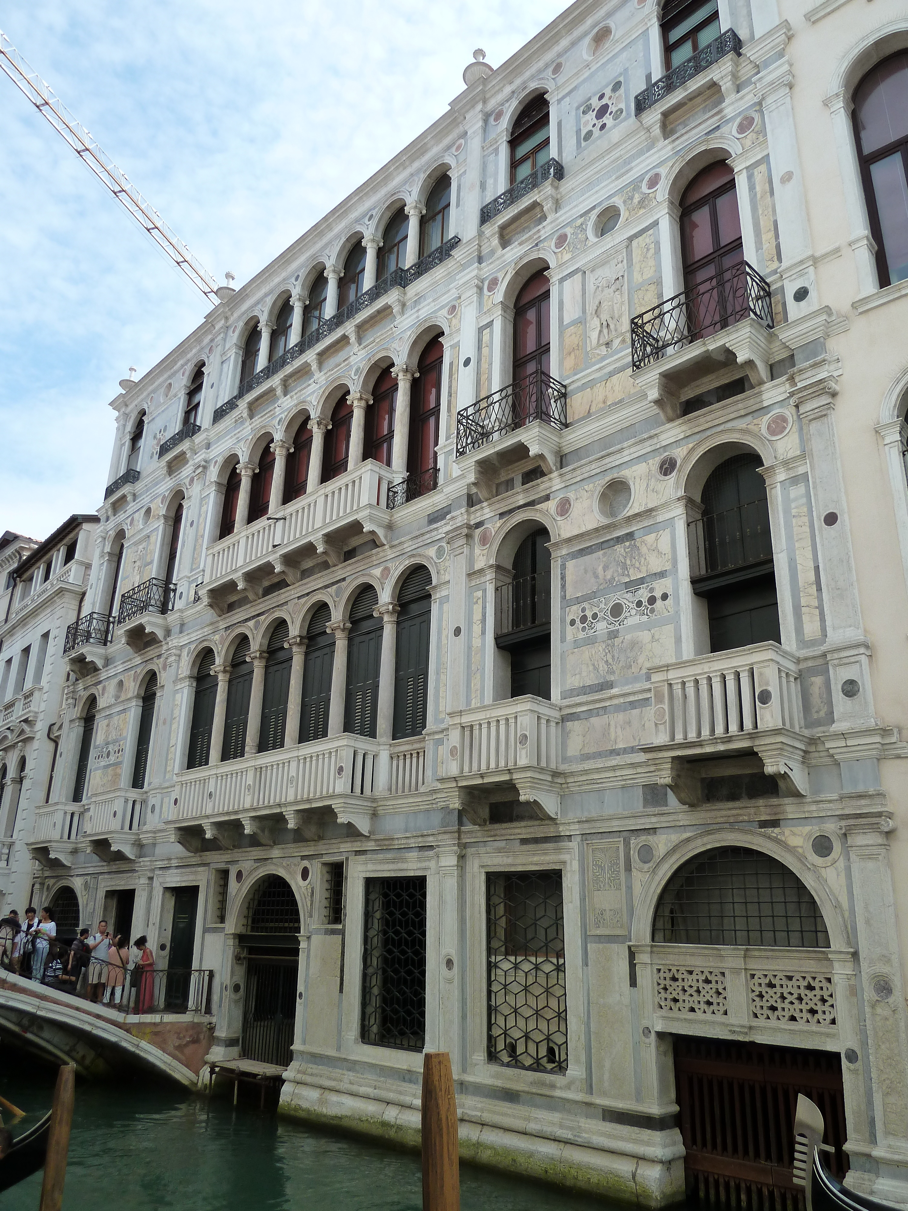 Palazzo trevisan cappello castello venezia